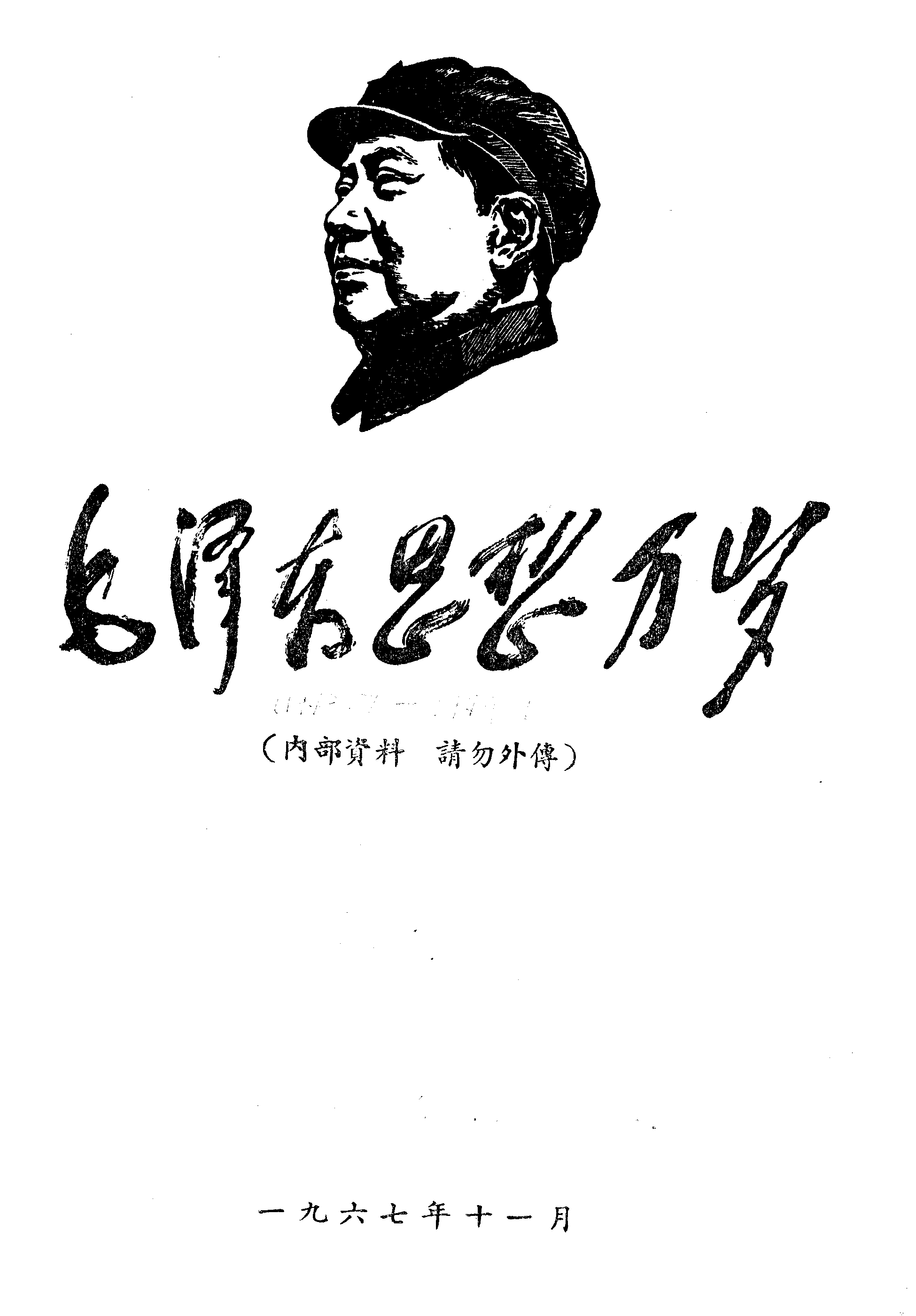 中文（中国大陆）: 1967年由武汉造反派组织“钢二司”编印的《毛泽东思想万岁》第二卷封面